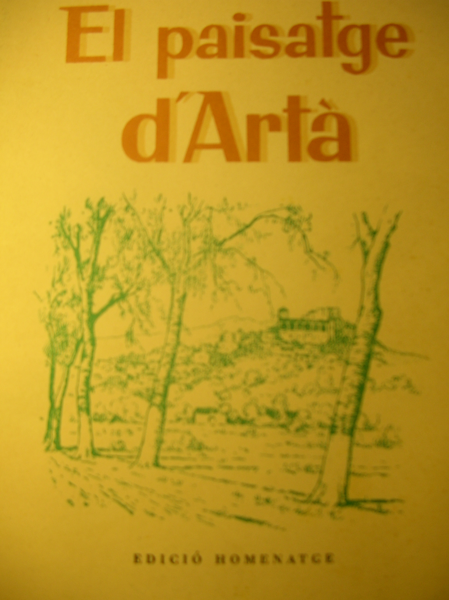 Llibre